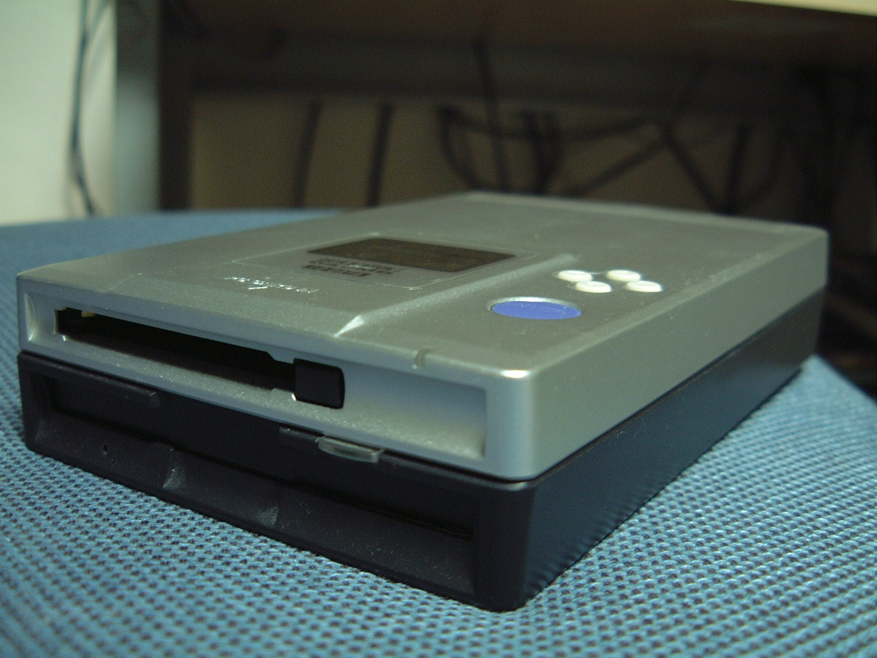 PCカードリーダー付きMOドライブ